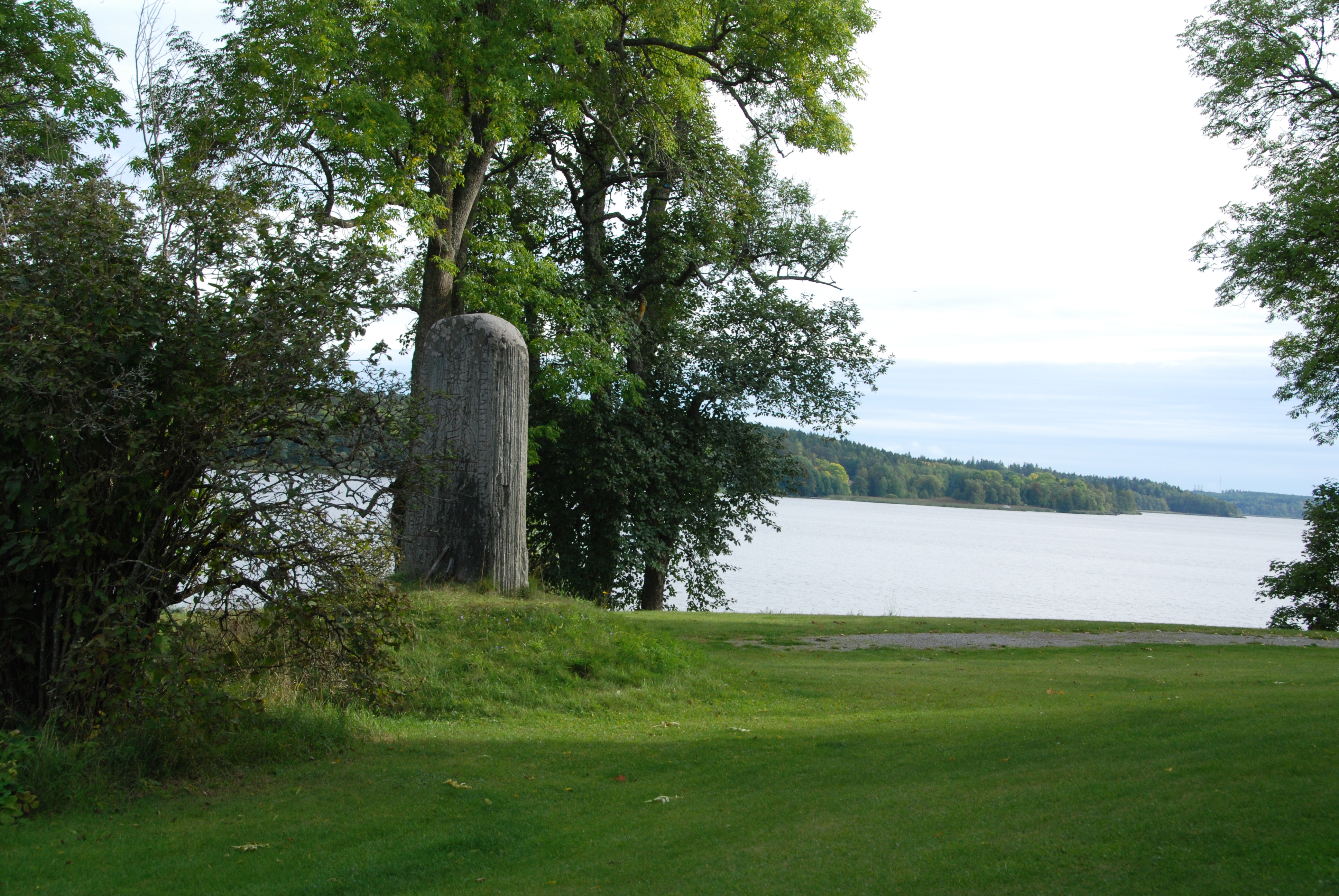 Skokloster 71:1